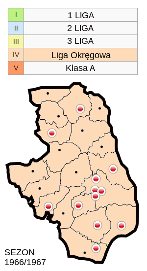 Jagiellonia w sezonie 1966/67- mapa klubów